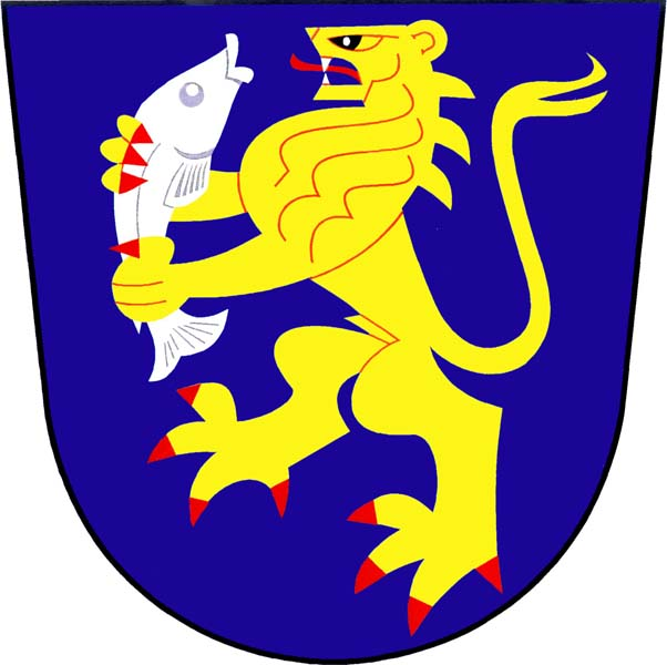 Znak obce Charvatce (okres Mladá Boleslav)